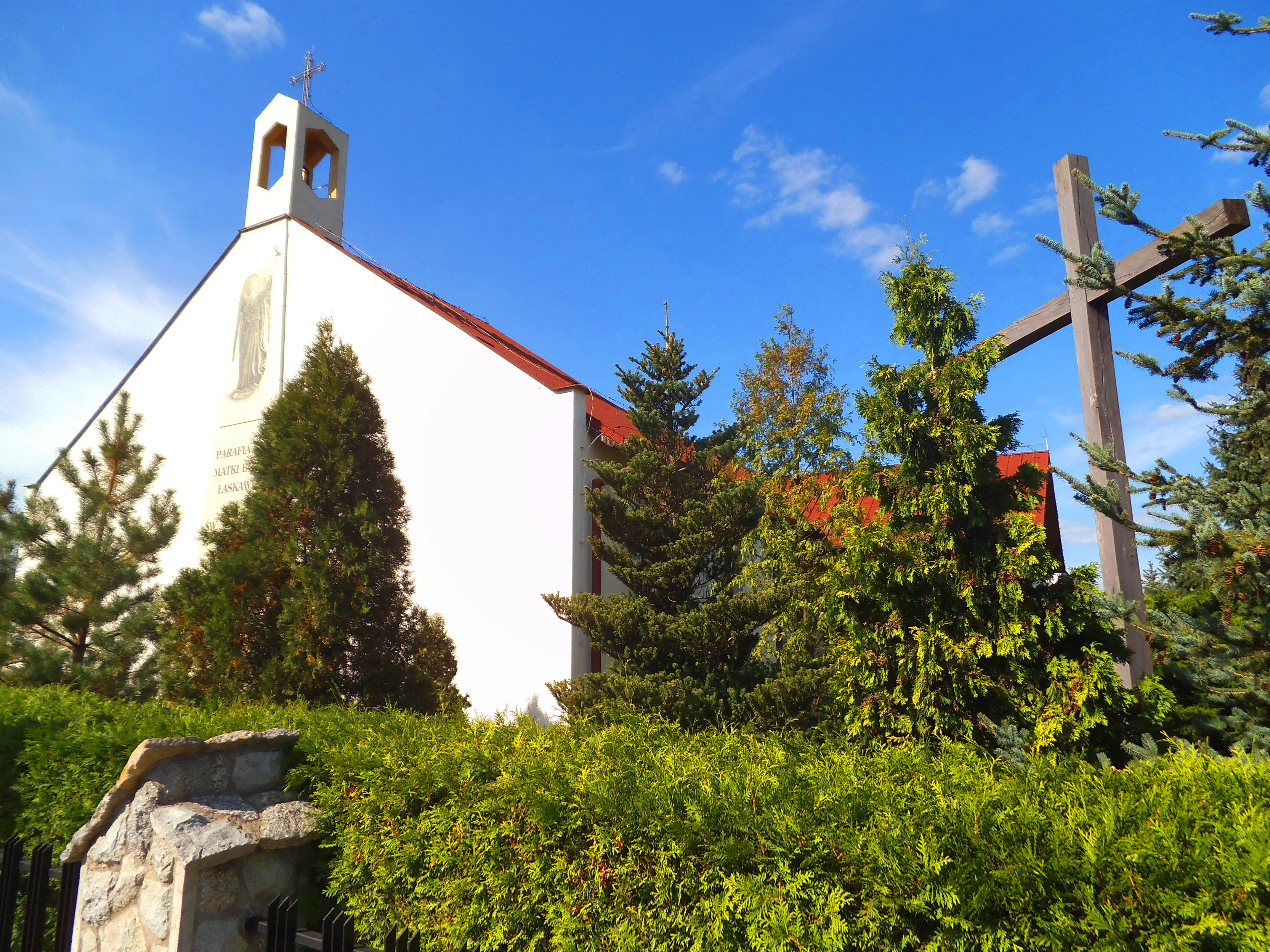 Kościół Matki Bożej Łaskawej w Toruniu